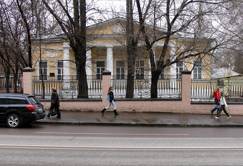 No. 49, Ostozhenka, Moscow, Russia, 1820s